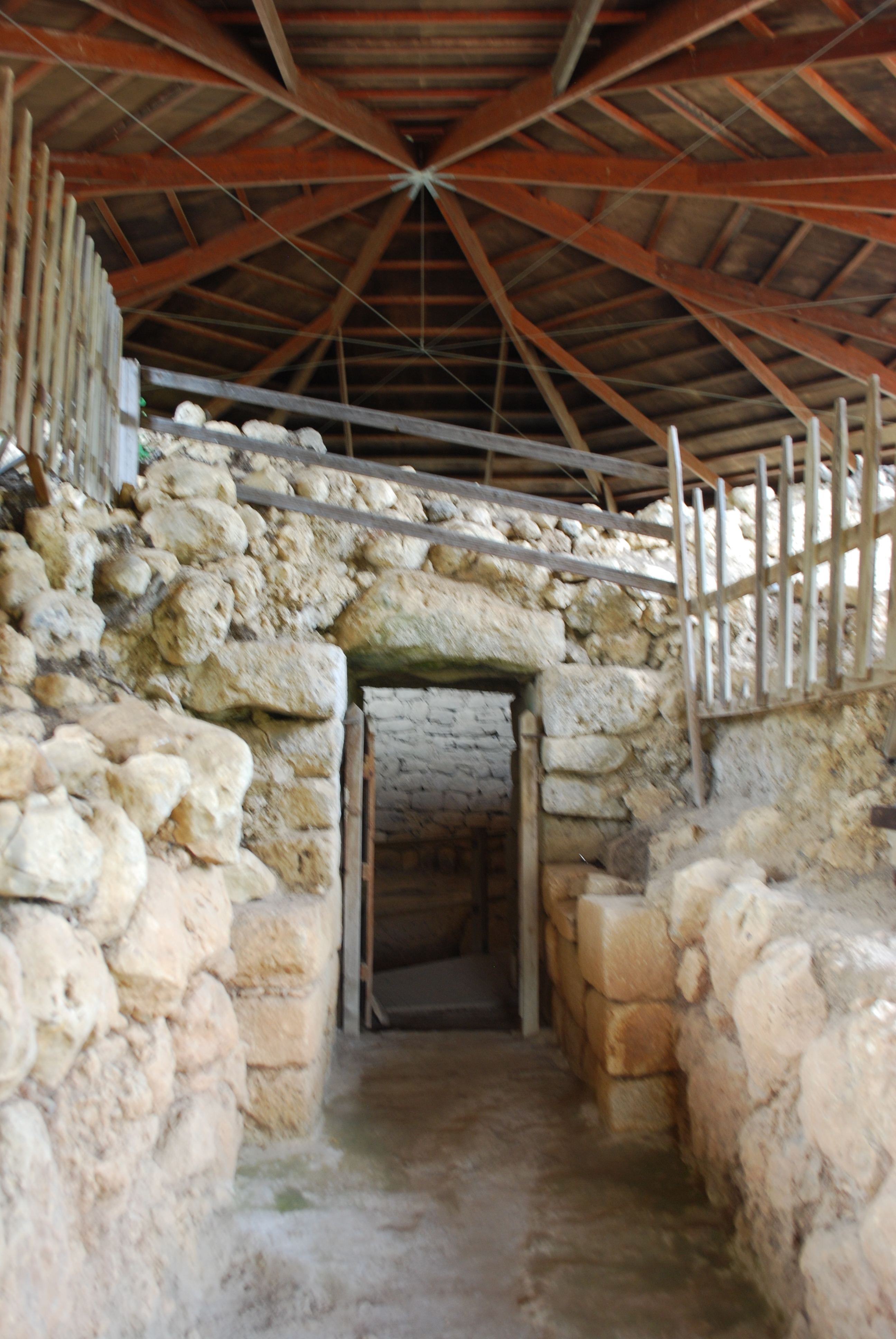 Vue de la tombe mycénienne de Tzanata (Kephalonia).